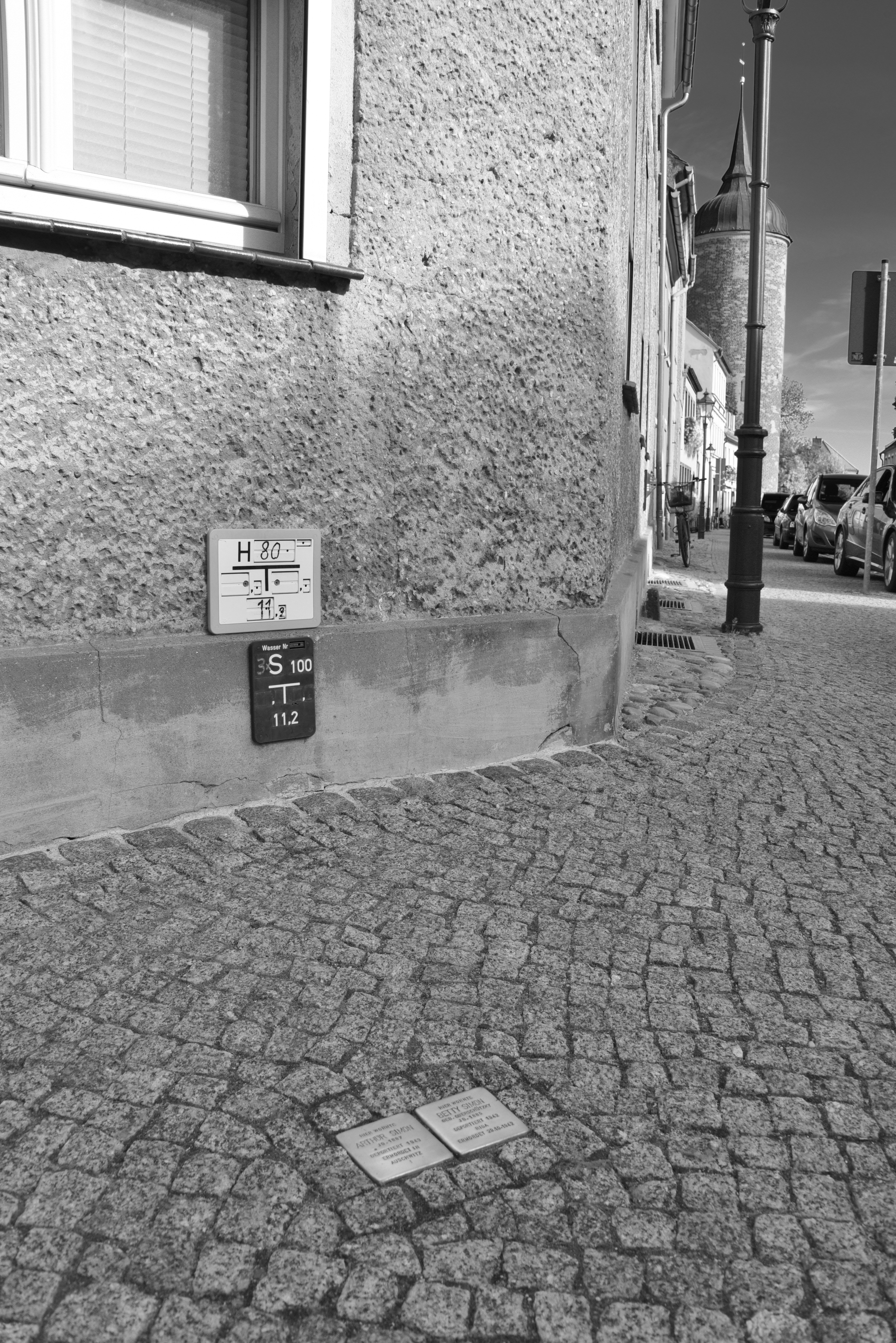 Stolpersteine in Luckau für das Ehepaar Simon